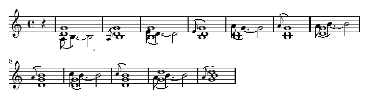 Hammerings für Verzierung, Vorschlag oder appoggiatura kommen im Beispiel im Wechsel mit Vorhalt mehrfach vor.